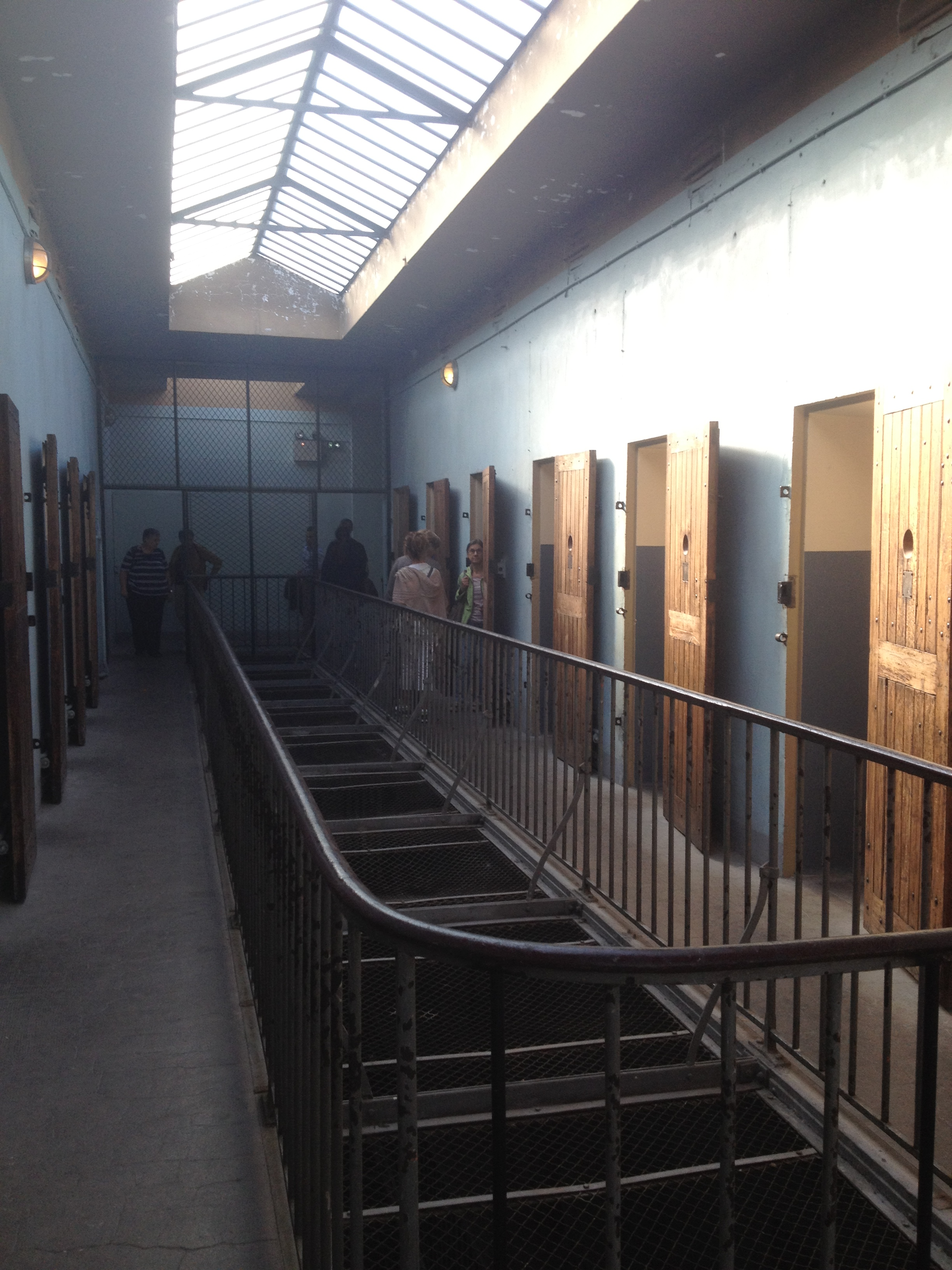 Second étage des cellules de la Prison Montluc